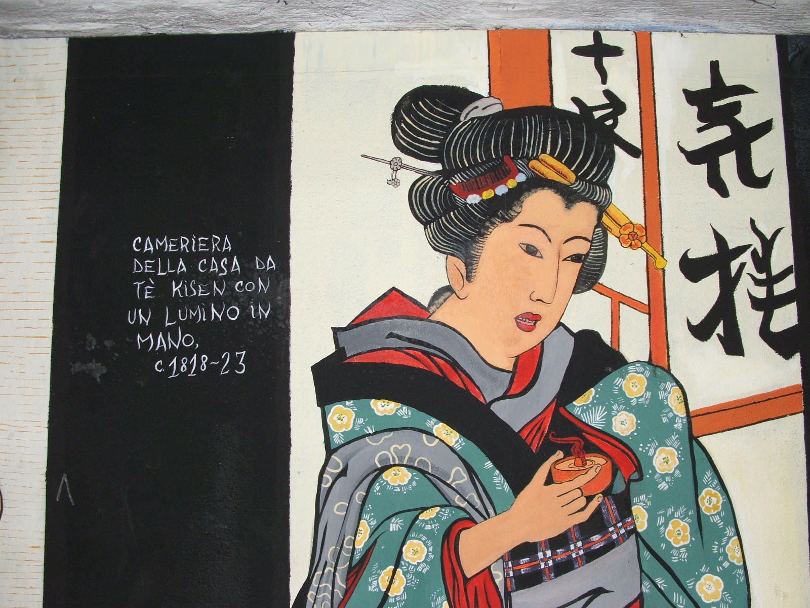 "Falsi d'autore", sottopassaggio di Piazza Corvetto (Genova) - disegni degli studenti del liceo artistico Paul Klee